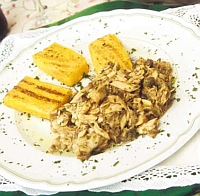 autore: alex pezzini fonte: ristorante antichi sapori descrizione: luccio in salsa